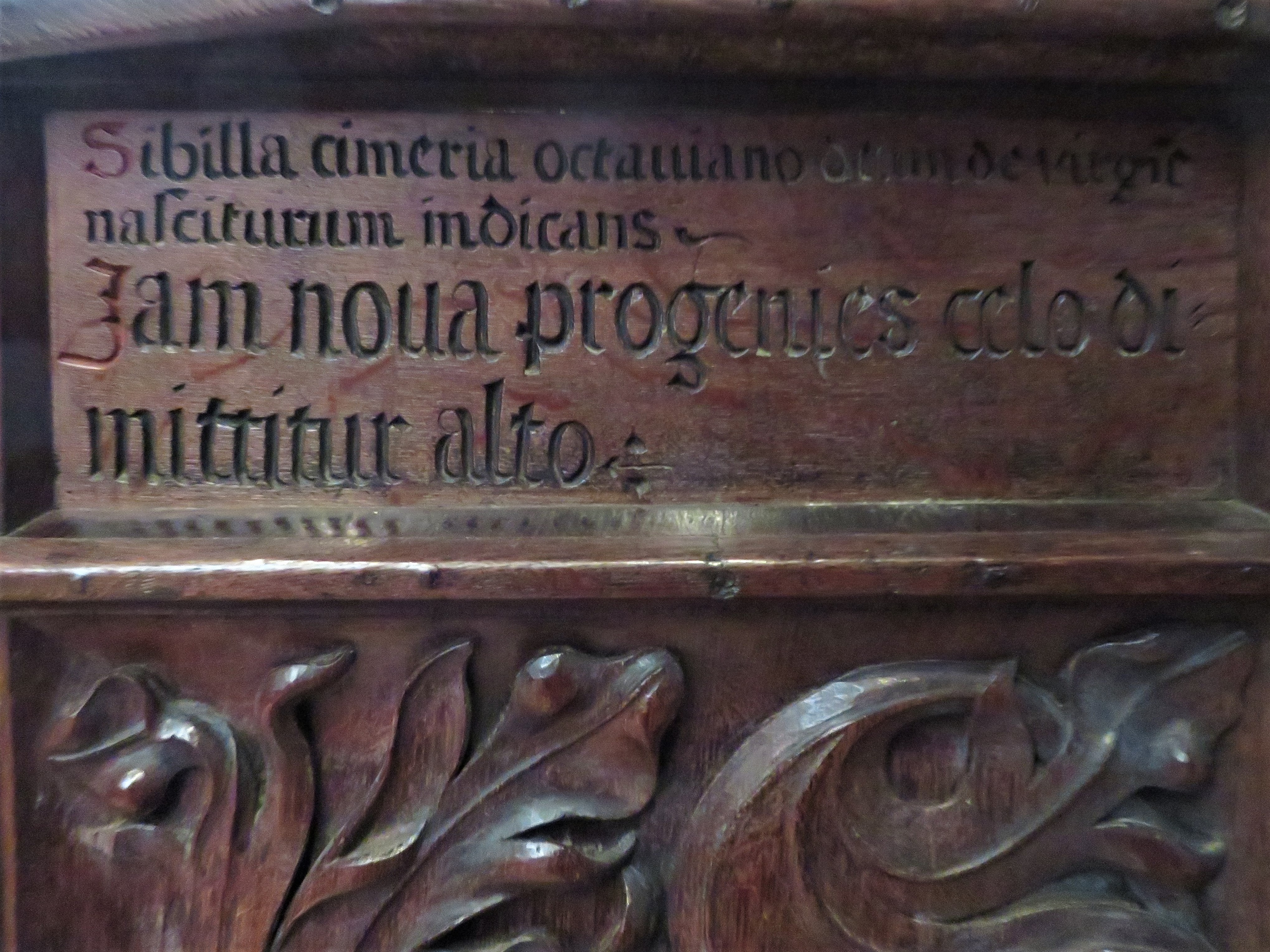 Detail des Chorgestühls im Ulmer Münster mit der Schrift Gotico-Antiqua